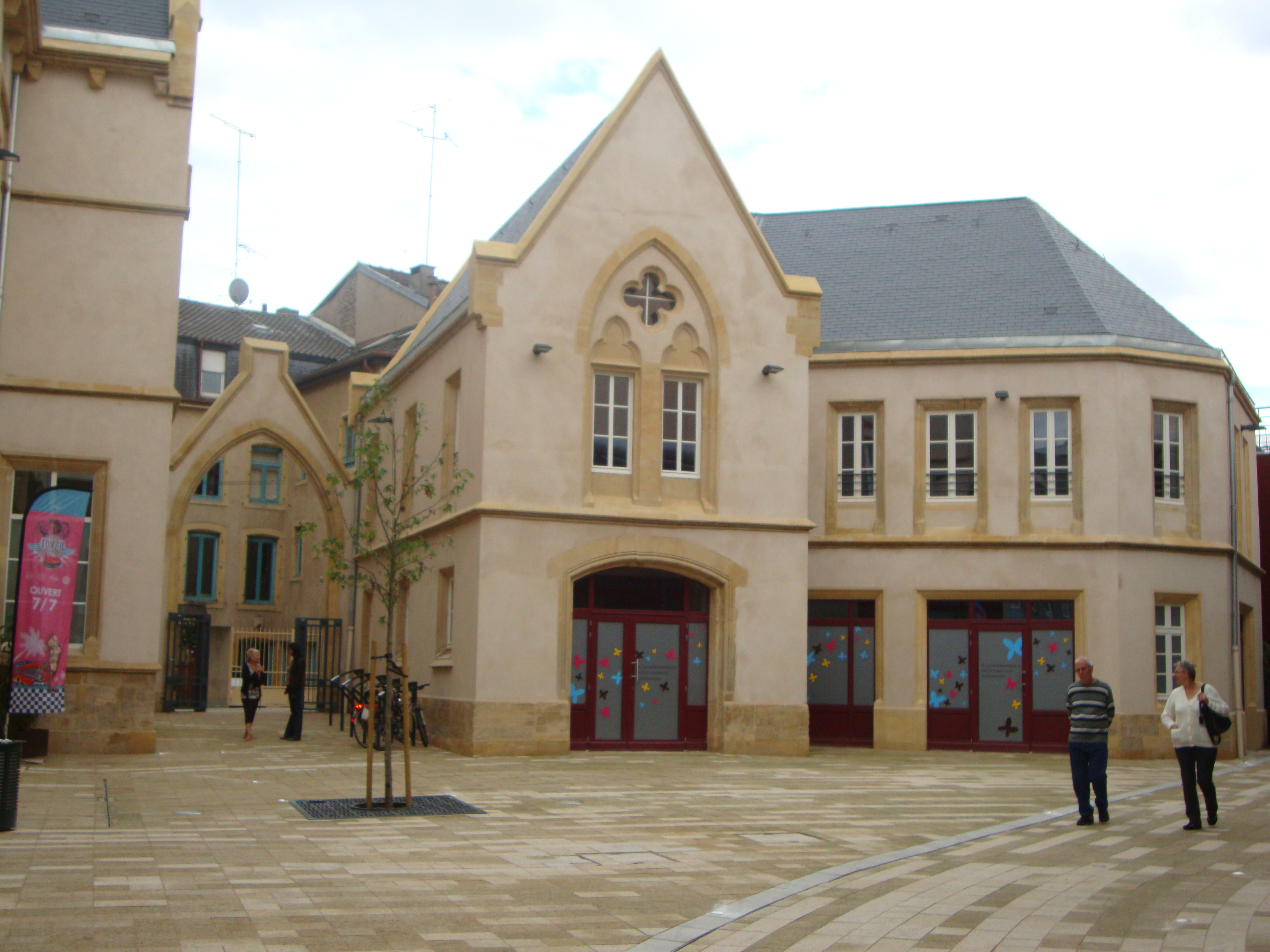 Thionville (57) - Cour des Capucins